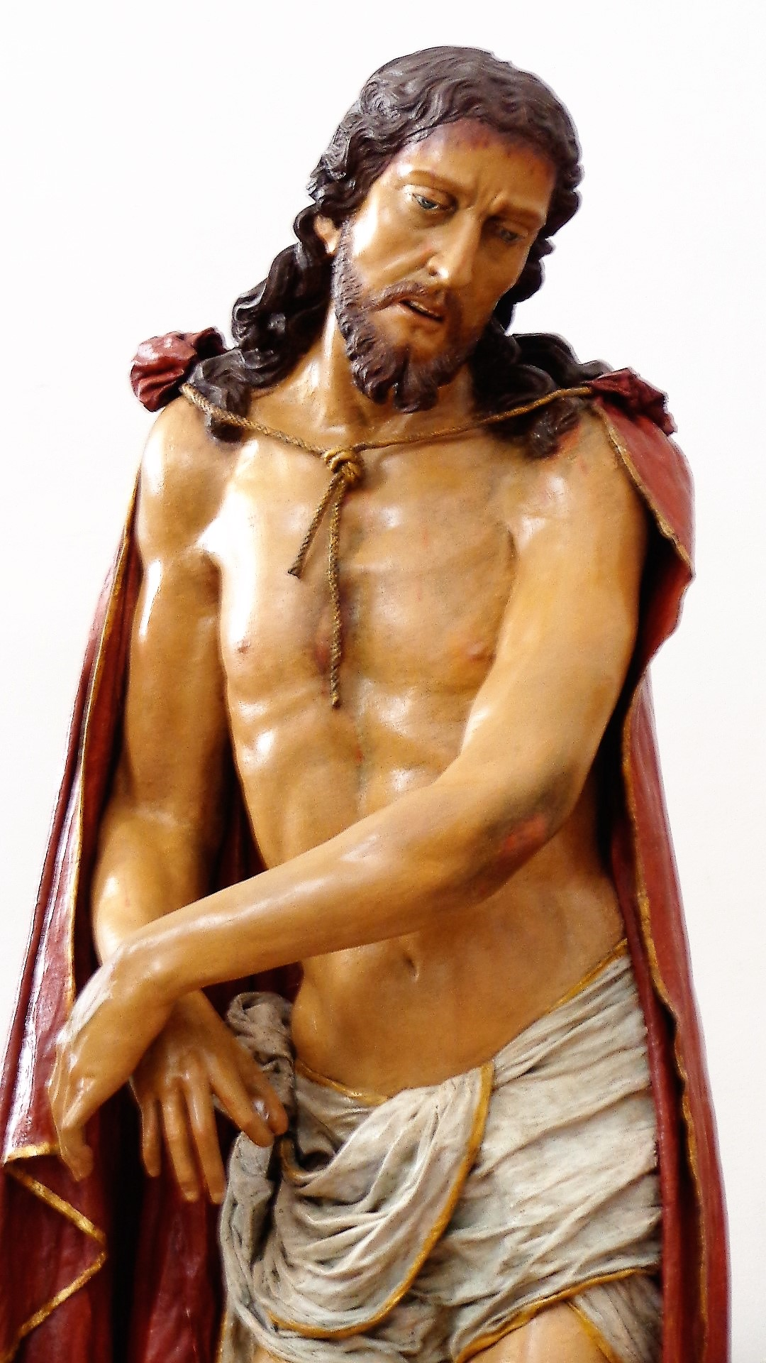 Statua gruppo dei Misteri in restauro presso i locali della navata sinistra della chiesa del collegio dei Gesuiti